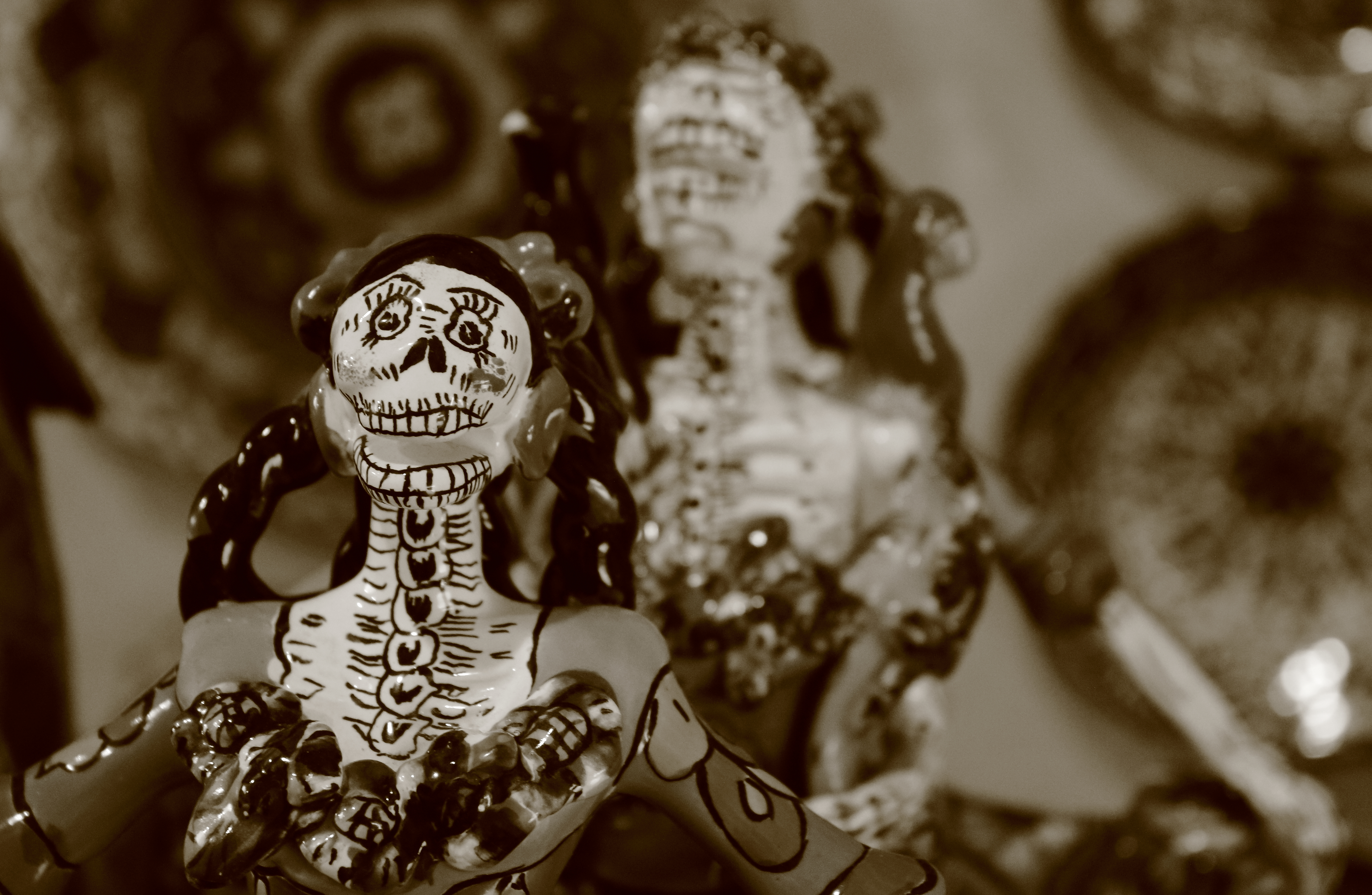 Figuras de catrinas en Puebla, México.